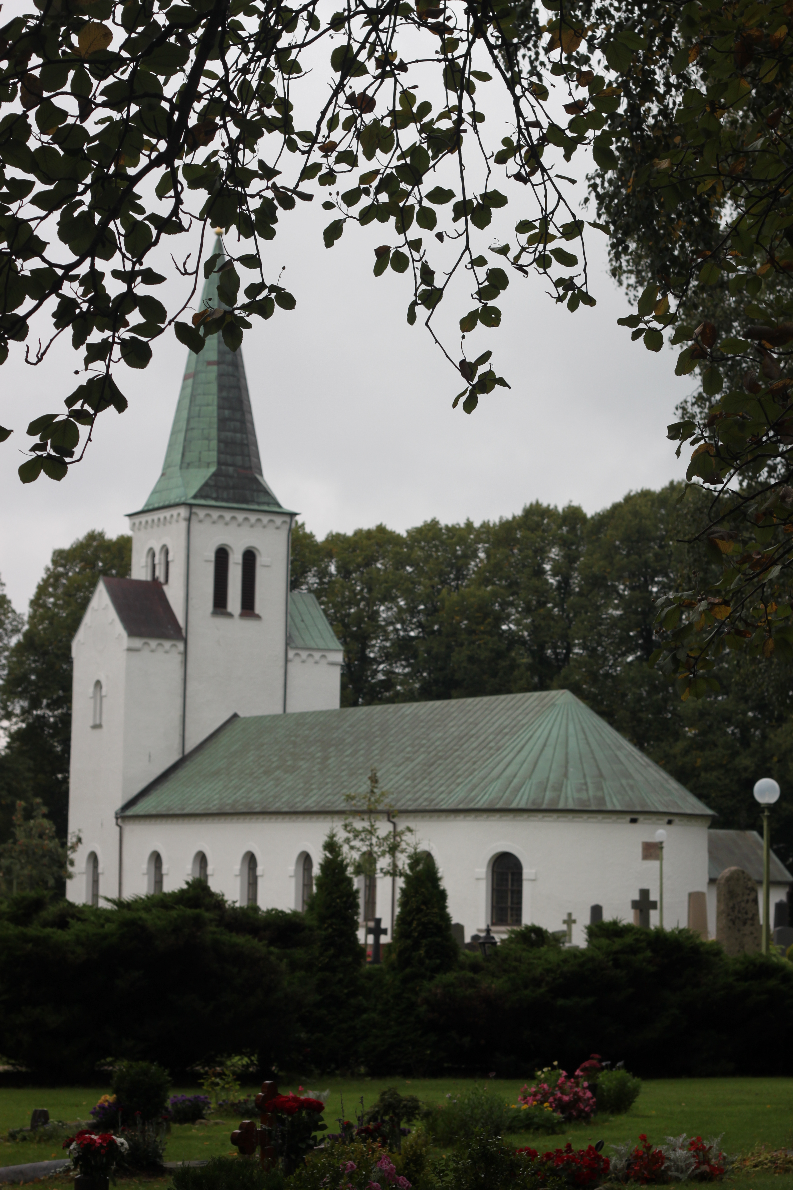 Getinge kyrka